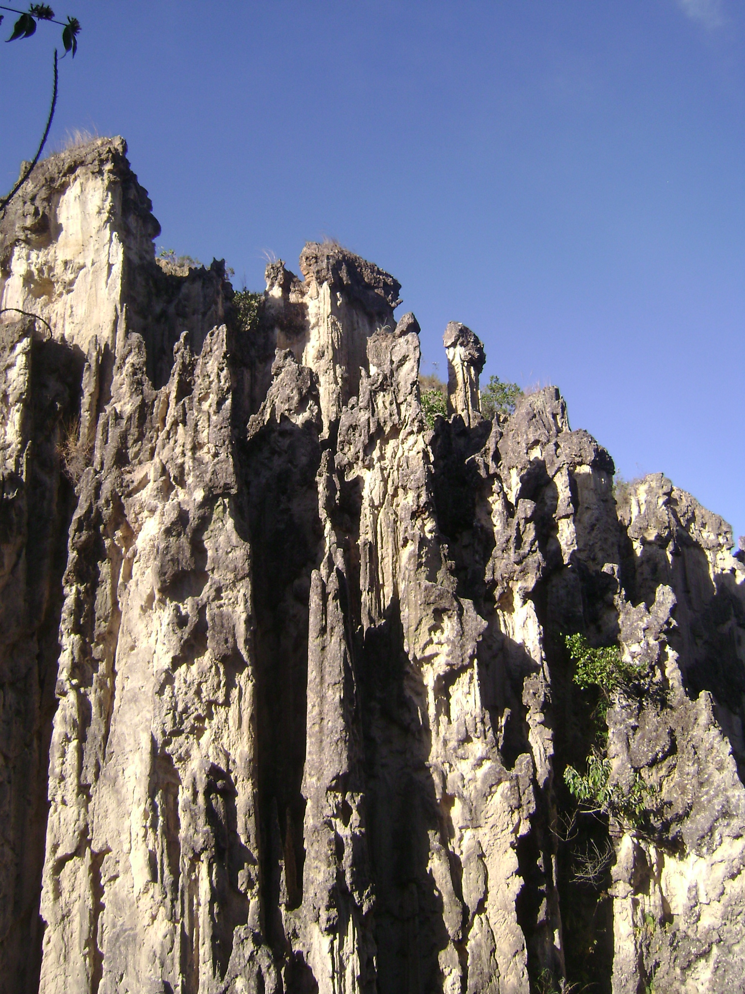 Estoraues La Playa de Belén